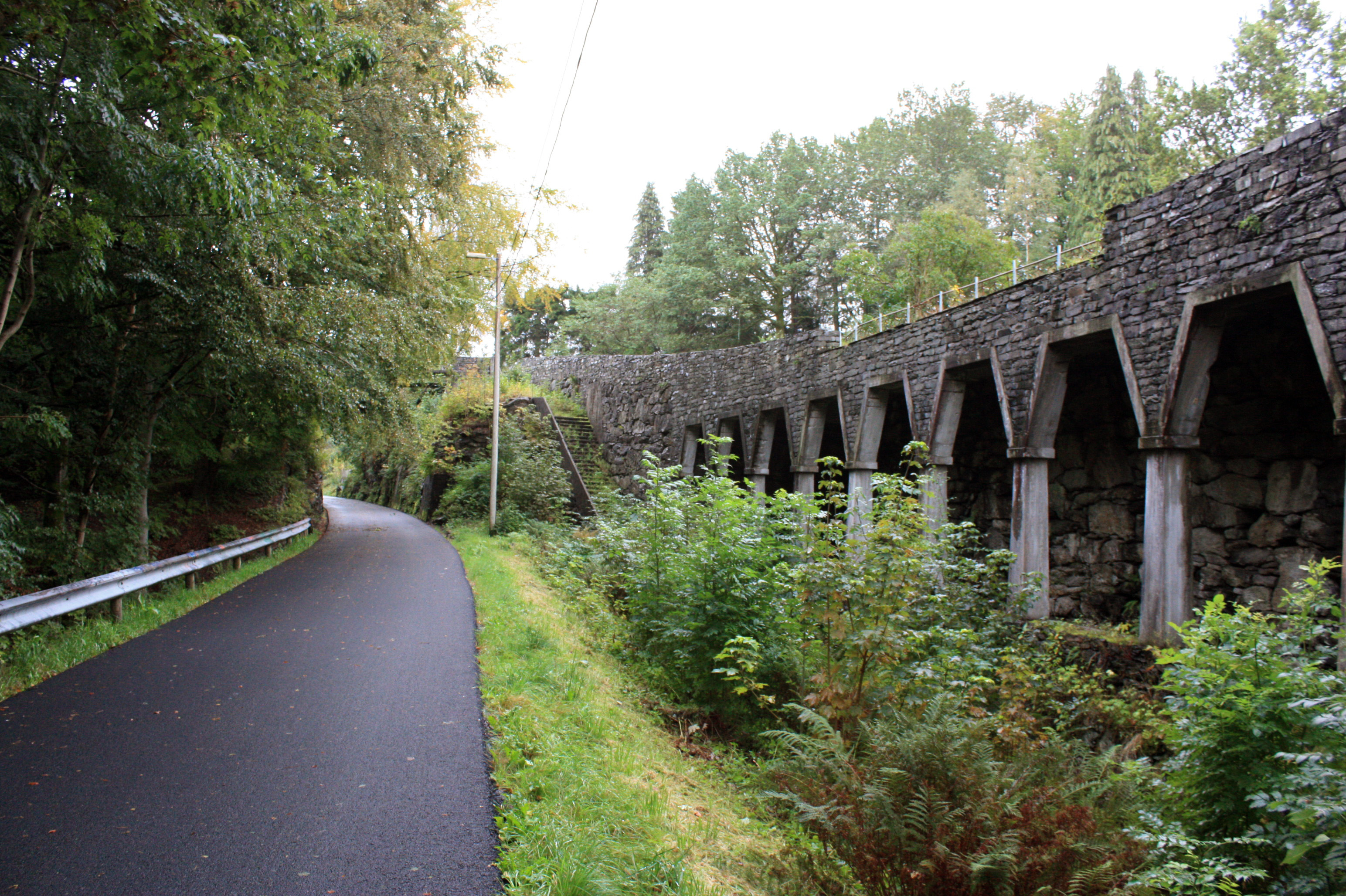 Paradisstranden, Fana, Bergen.